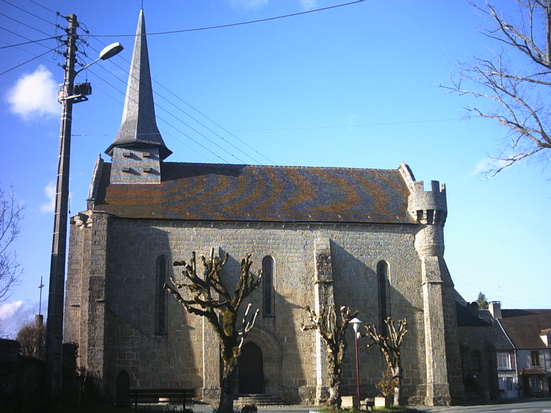 Vue générale de l'église de Bonnat. Photo personnelle.